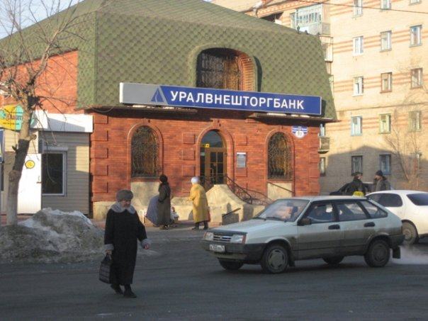 Отделение Уралвнешторгбанка в городе Южноуральск